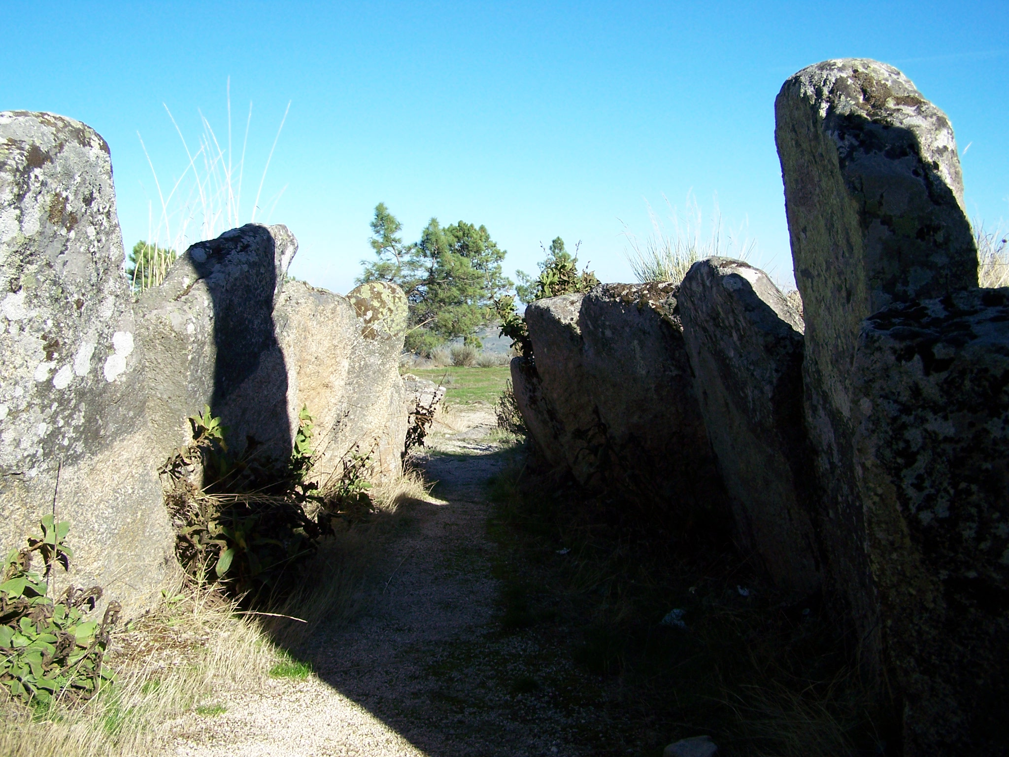 Necrópole megalítica Lameira de Cima, freguesia de Antas, Penedono, Portugal. Vista para dólmen.